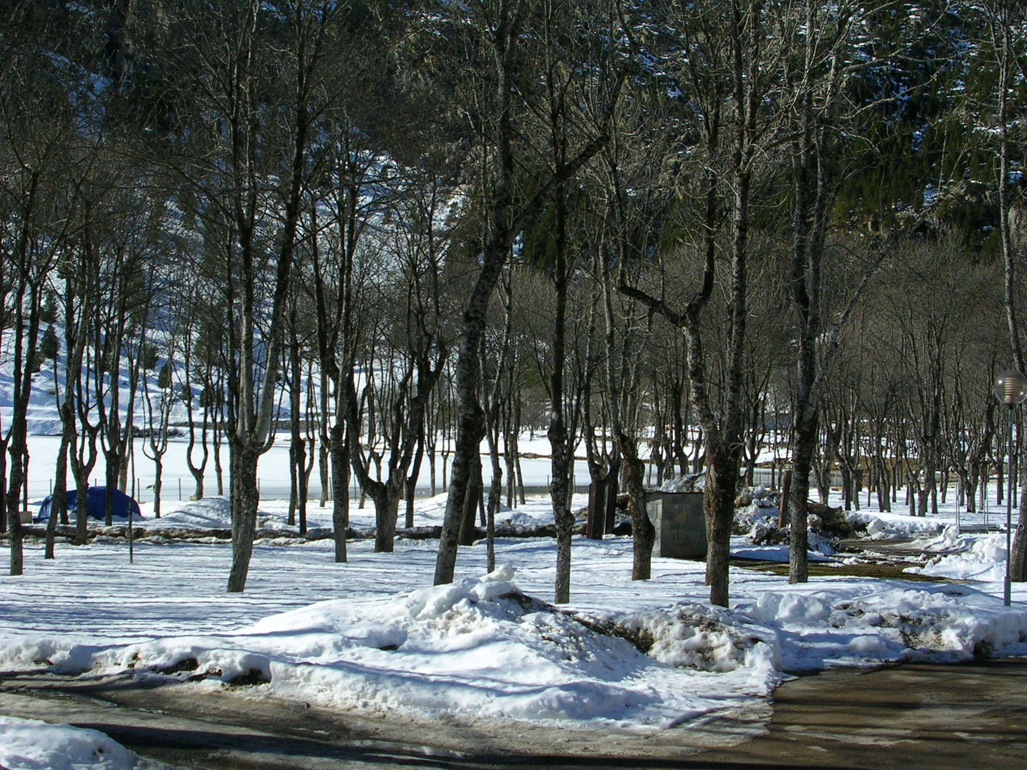 Balneario de Panticosa en el Pirineo Aragonés.